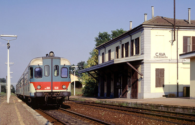 Stazione ferroviaria di Cava-Carbonara, in sosta l'automotrice ALn 668.1538.